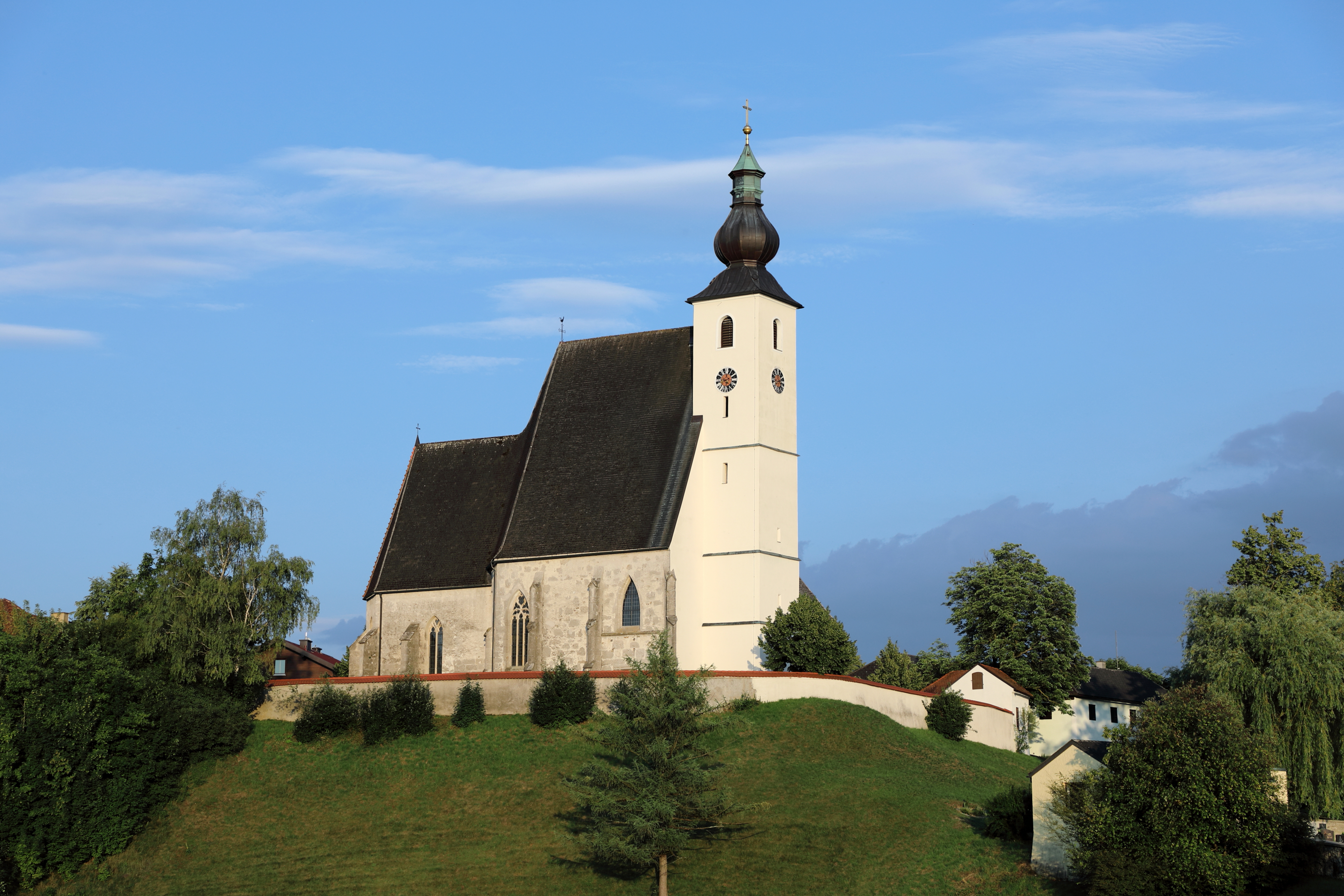 Abendliche Nordwestansicht der röm.-kath. Pfarrkirche Mariä Namen in der oberösterreichischen Gemeinde Rüstorf.